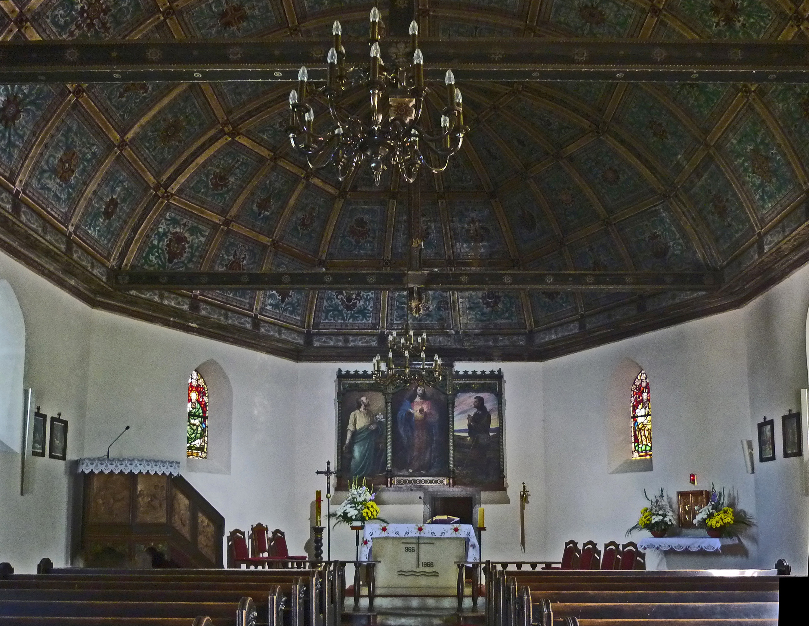 Herz-Jesu-Kirche in Krummhübel (Karpacz) im Riesengebirge, ehem. evangelische Kirche